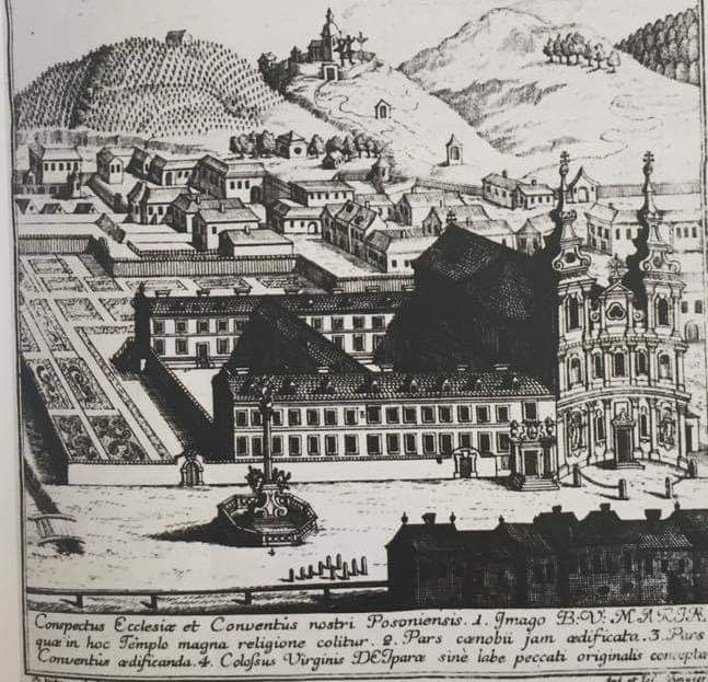 Im Hintergrund der Preßburger Kalvarienberg